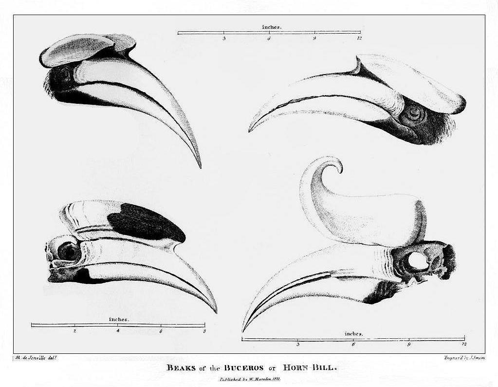 William Marsden: The History of Sumatra. Tafel XXI: Beaks of the Buckeros